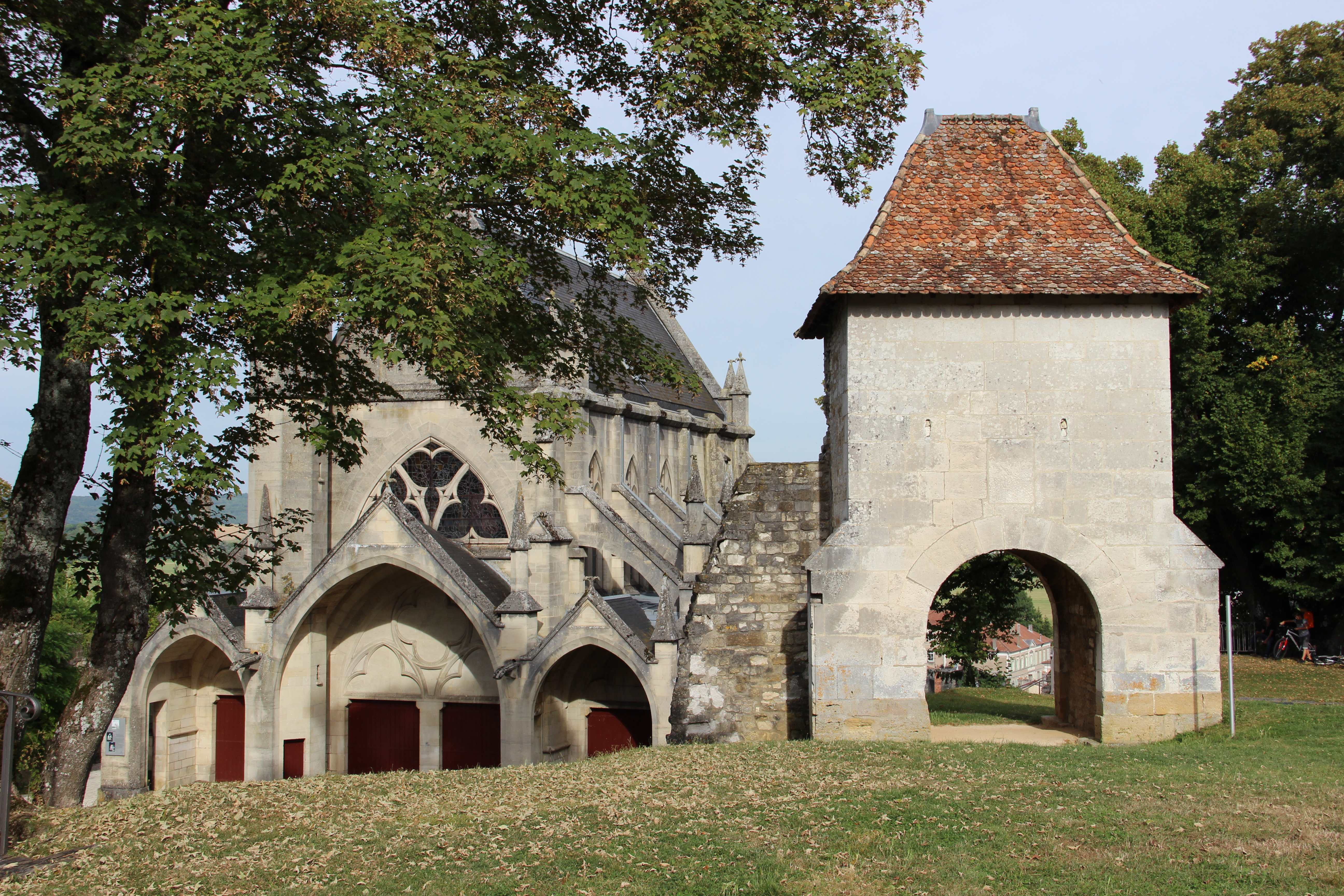 Porte de France et Chapelle castrale